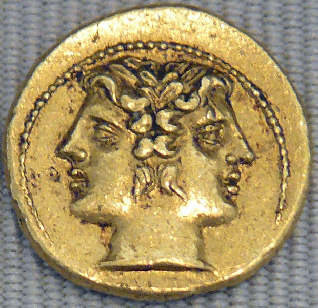 Demi-statère de Rome, tête de Janus, vers 217 av. J.C., or 3,41 g - AF 69 - Cabinet des médailles, Paris